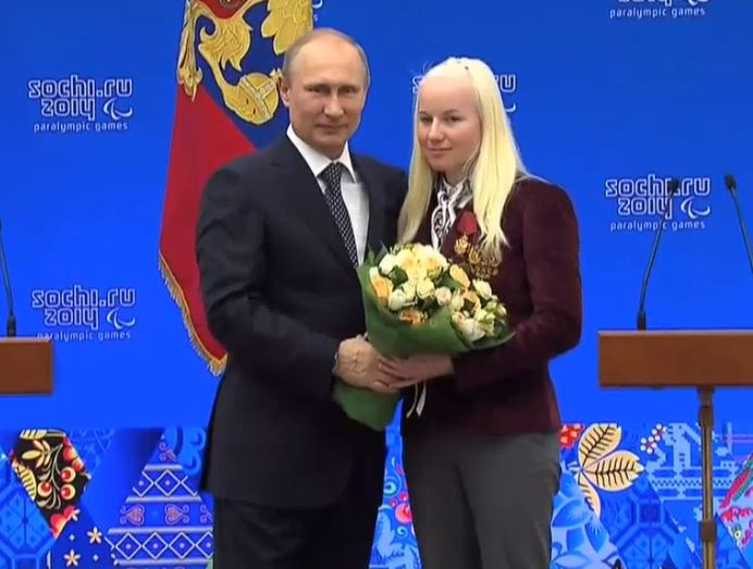 Двукратная паралимпийская чемпионка, серебряный и бронзовый призёр Паралимпийских игр в горных лыжах Александра Францева.